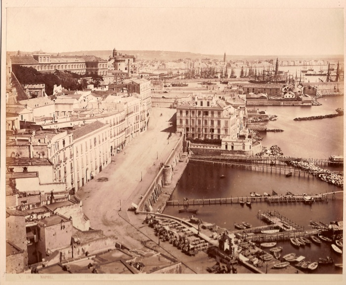 Giorgio Sommer (1834-1914) - n° 11?? - Napoli, S. Lucia e Hotel de Rome (1865 circa).